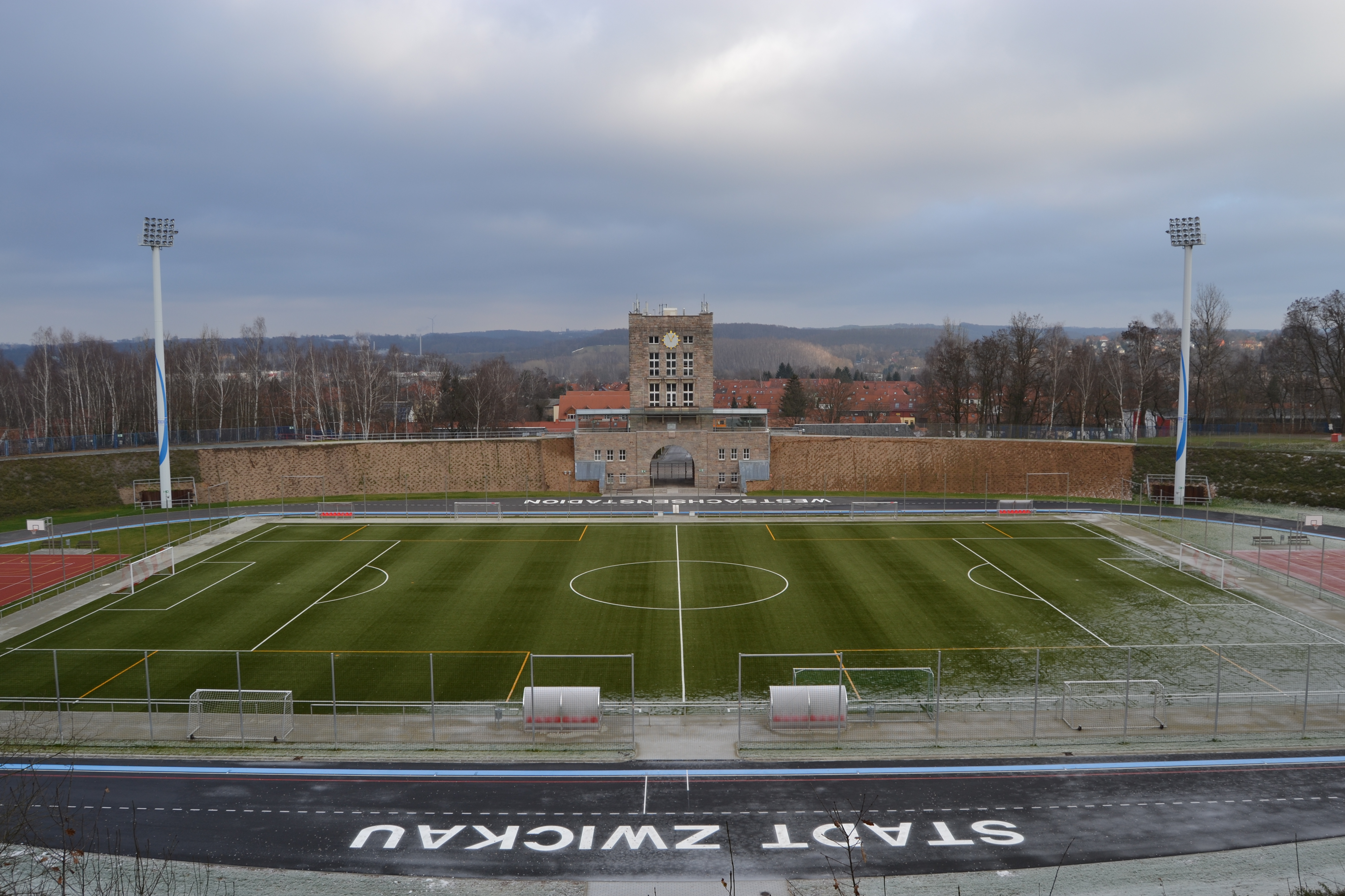 Das Westsachsensatdion in Zwickau-Schedewitz